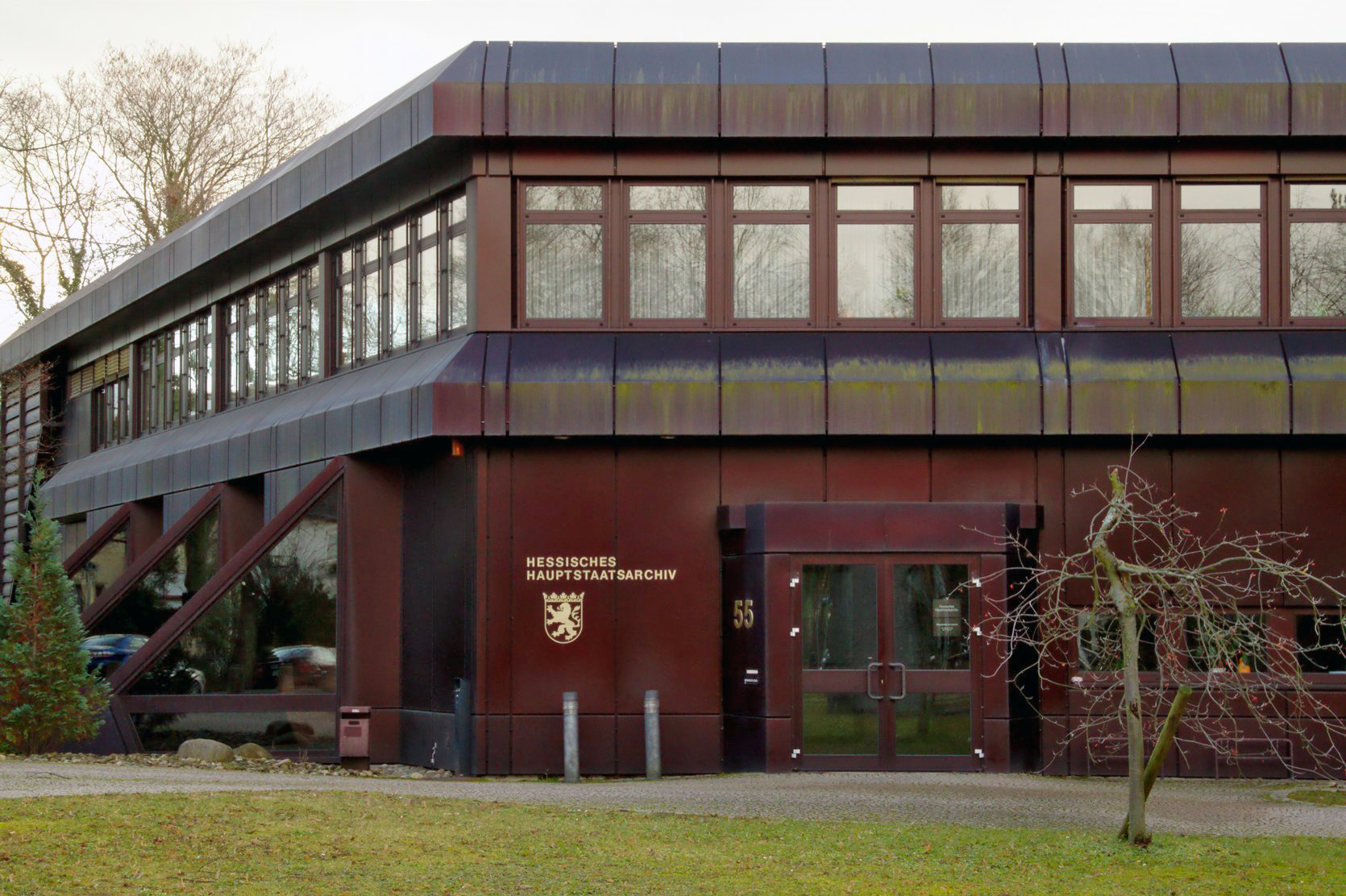 Hessisches Hauptstaatsarchiv in Wiesbaden